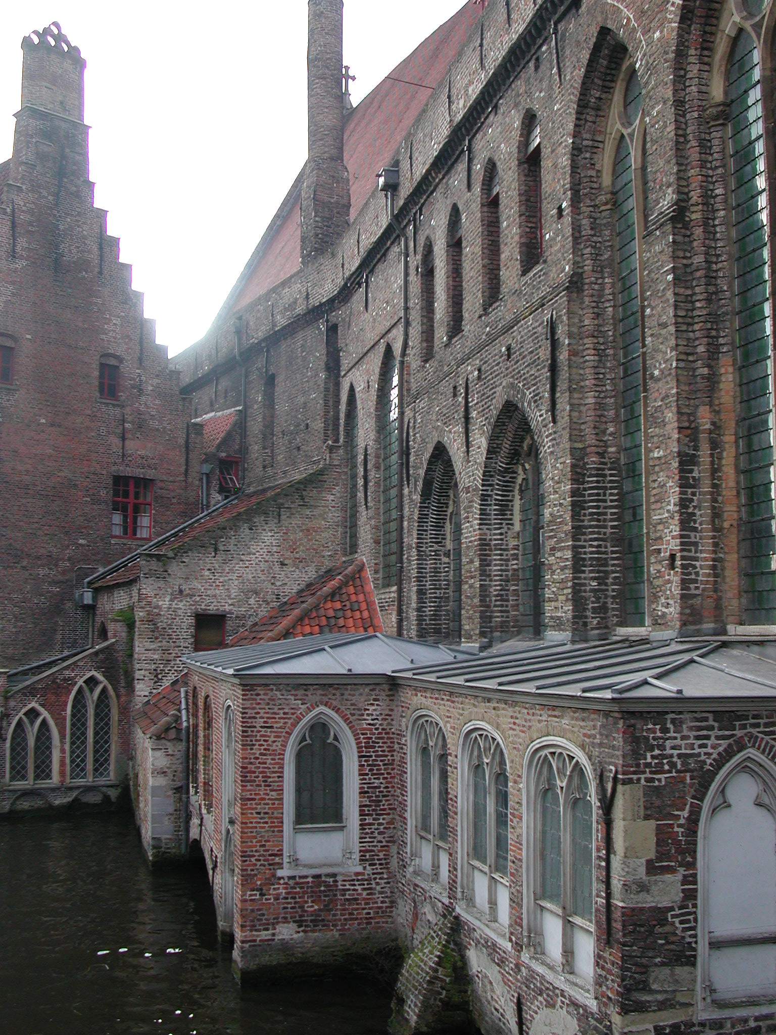 Zuidgevel van het Middeleeuwse Sint-Janshospitaal in Brugge